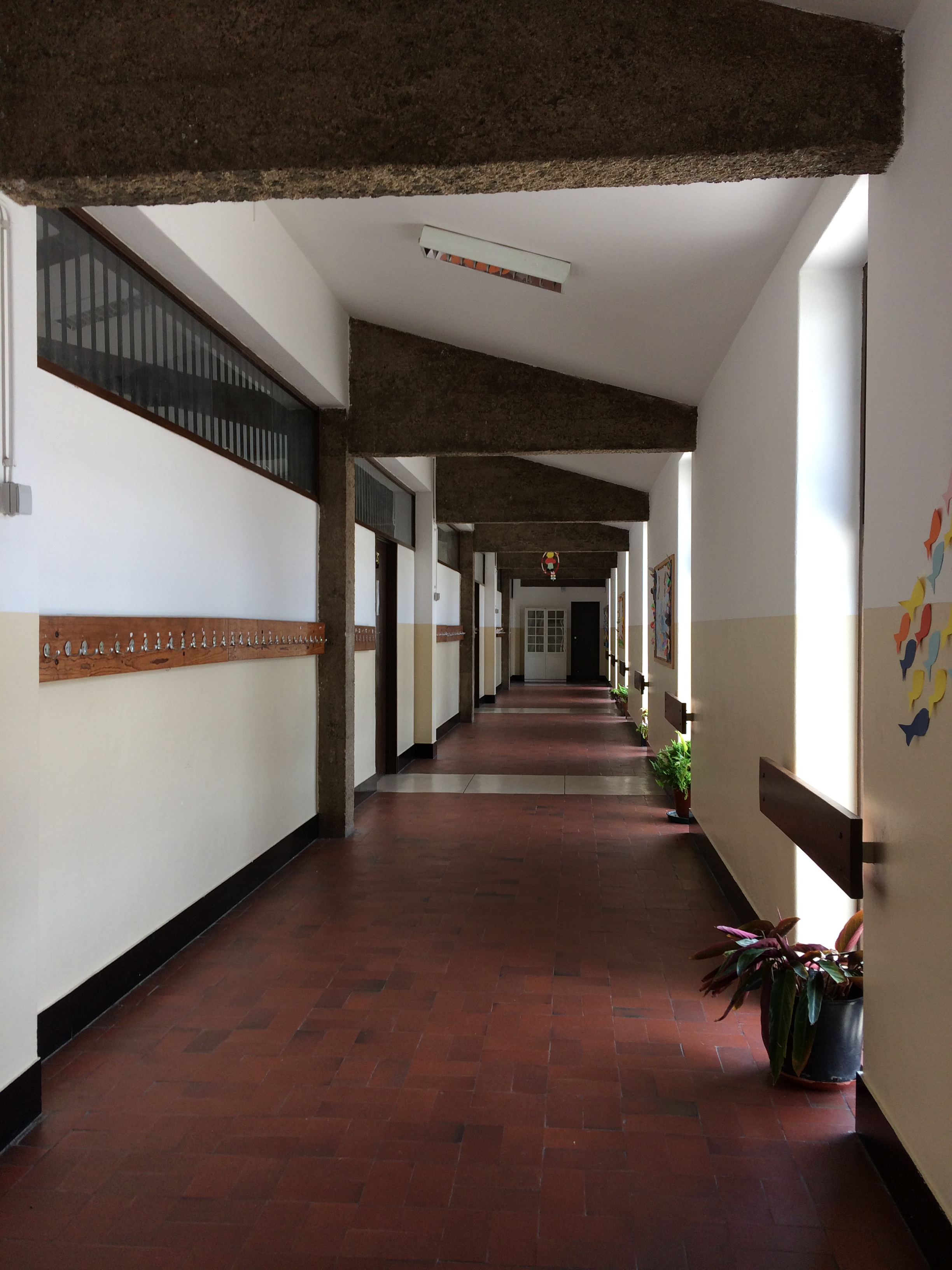 Escola Primária do Cedro (Gaia, 1958-60) - escola em Vila Nova de Gaia, Portugal Cultural property Escola Primária do Cedro, Mafamude, Mafamude e Vilar do Paraíso, Vila Nova de Gaia, Porto District, Portugal Q66814849, SIPA ID: 20364, DGPC ID: 327671 Wiki Loves Monuments ID: DGPC-327671